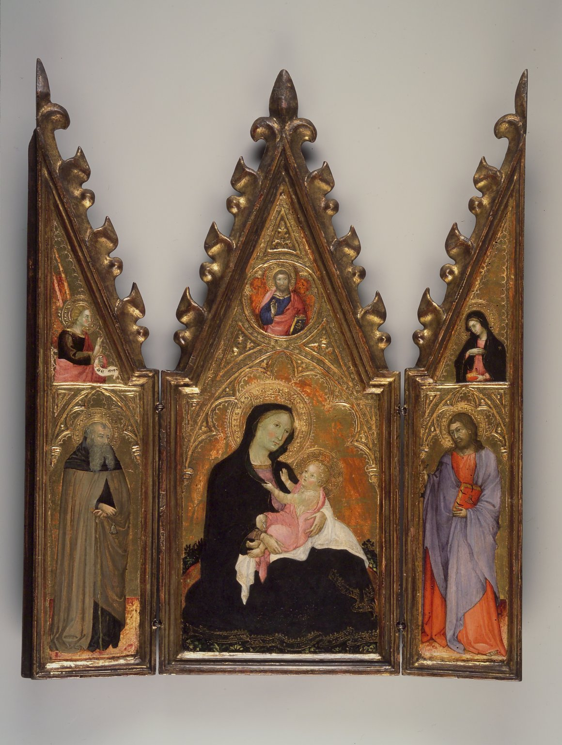 portable altarpiece